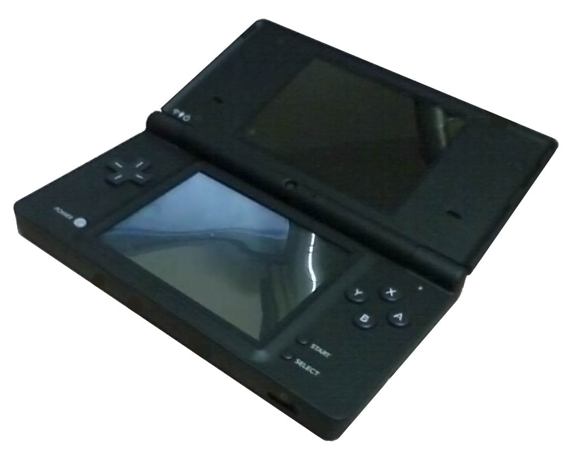 A black Nintendo DSi.